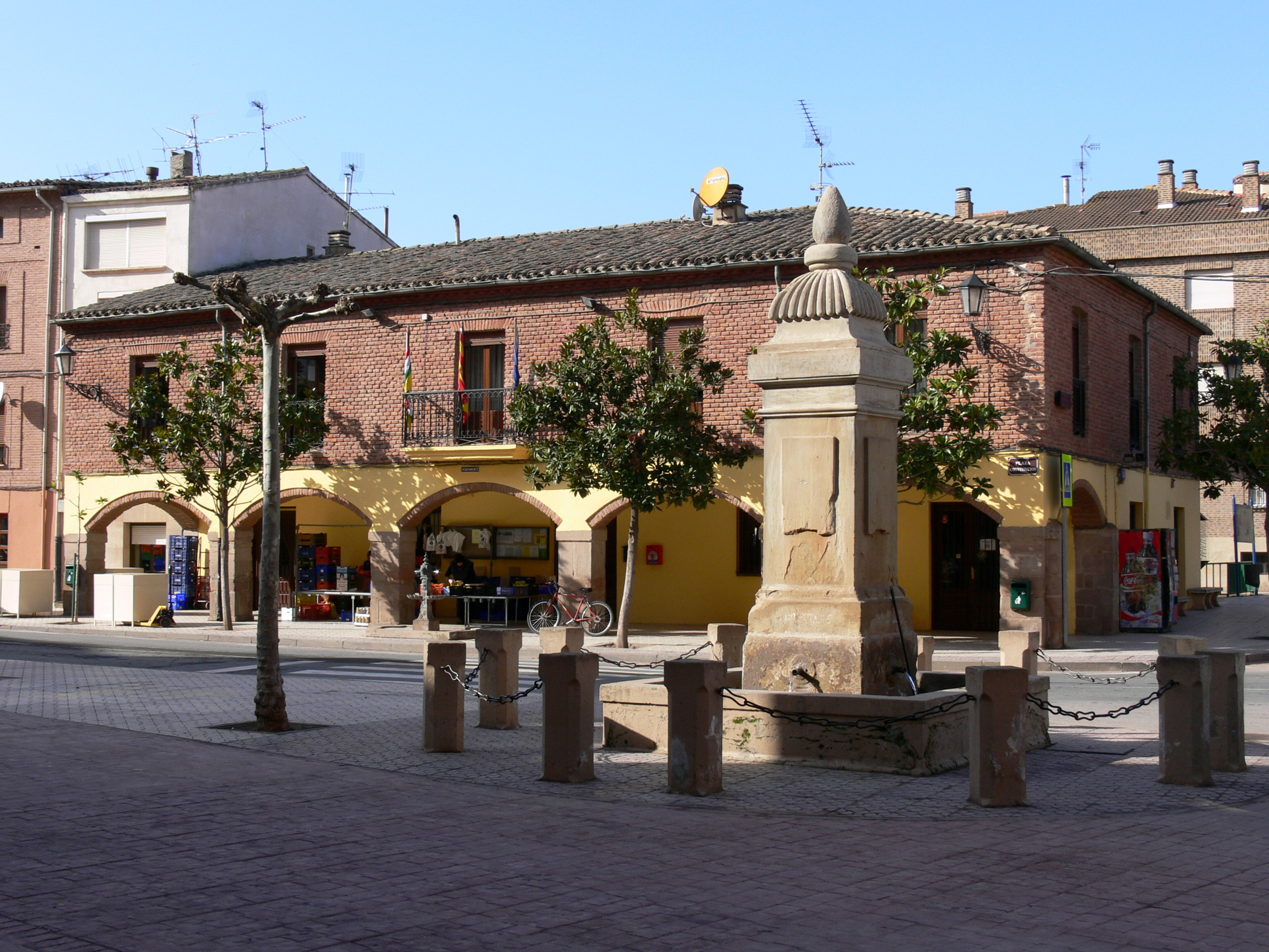 ALESANCO. Plaza de la Constitución.